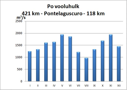 Po hüdrograaf